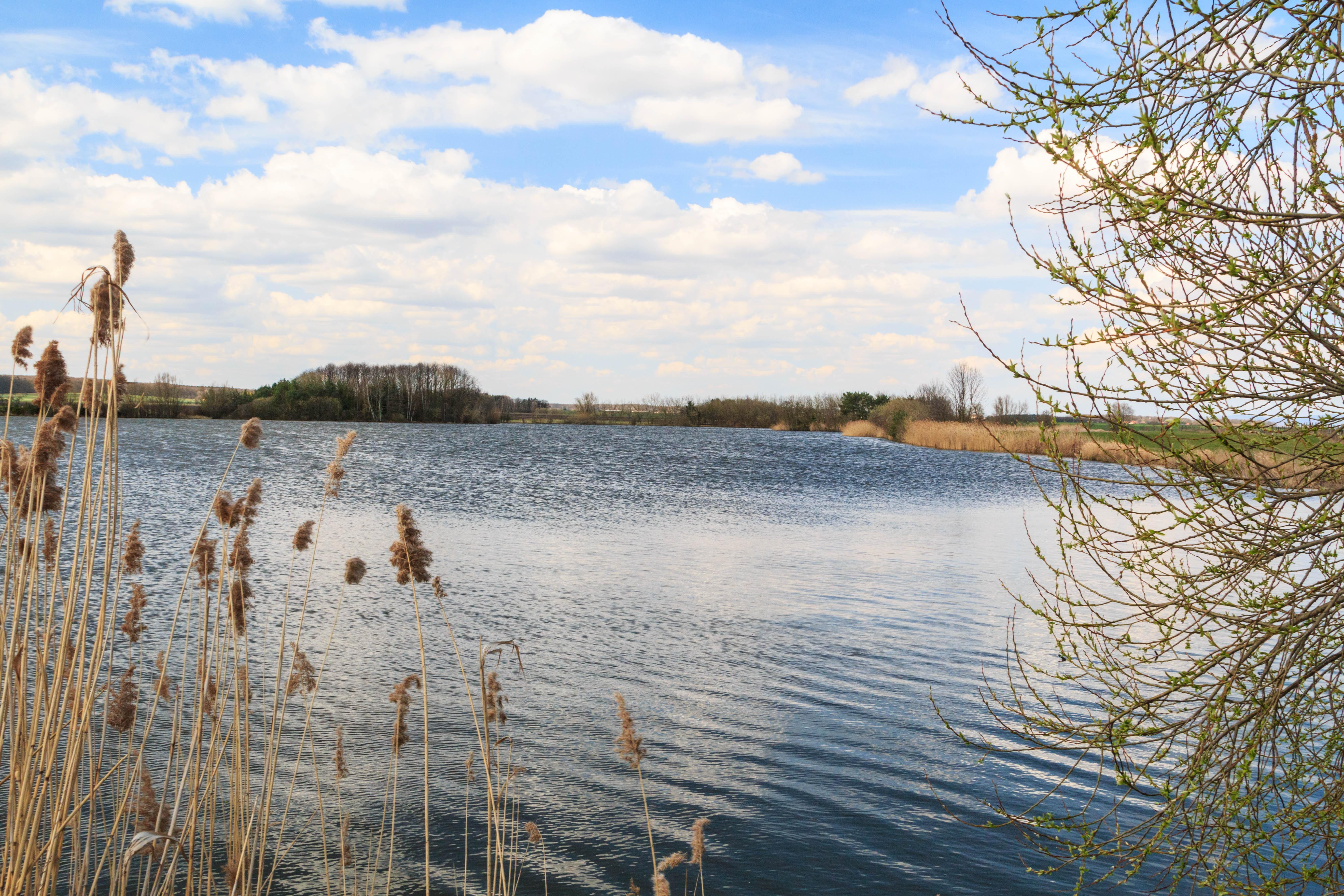 Rybník Říha u Skochovic Project: Vodstvo.